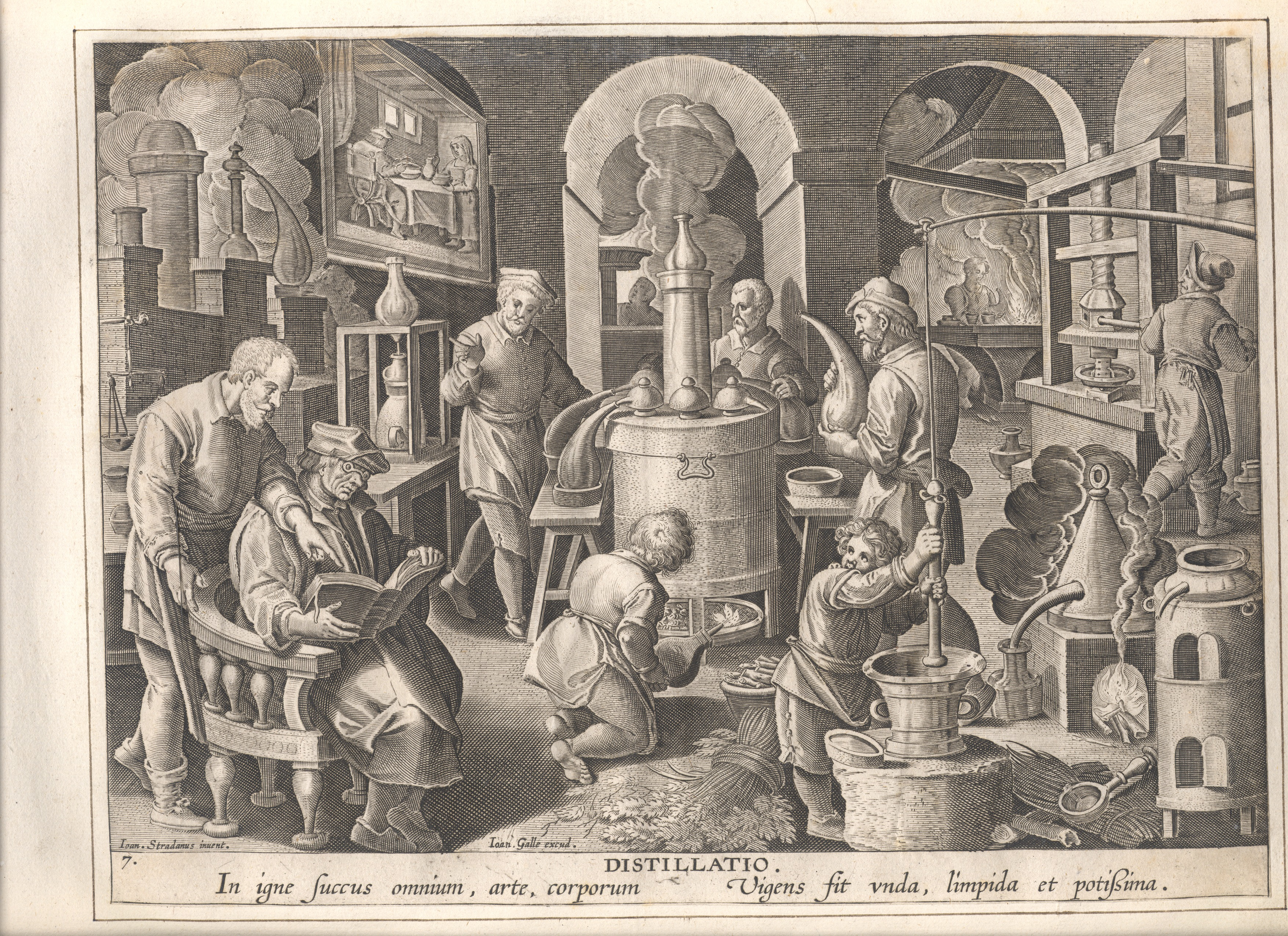 Gravure ( anoniem, Museum Plantin-Moretus